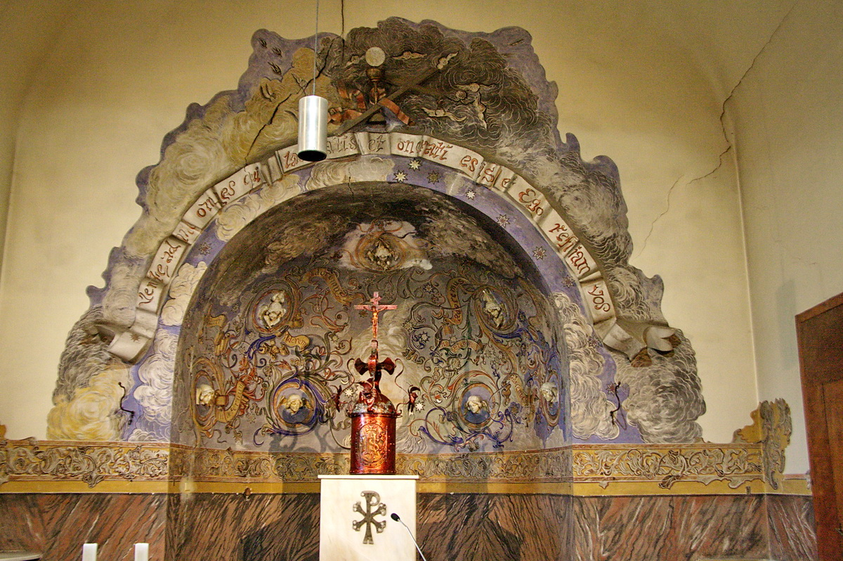 Decoració interior i sagrari de l'església de Sant Joan Baptista a Sant Joan Despí al Baix Llobregat, Catalunya, obra de l'arquitecte modernista Josep Maria Jujol el 1943.